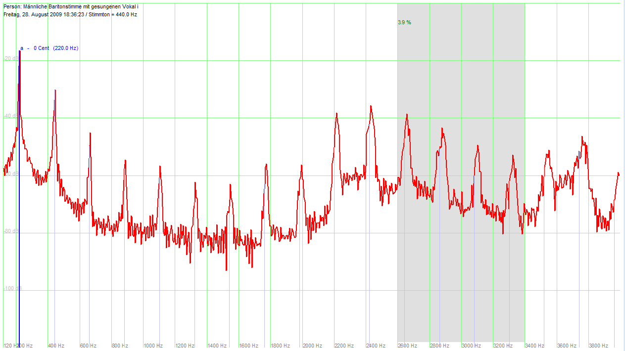 Von einem unausgebildeten Bariton gesungener Vokal i